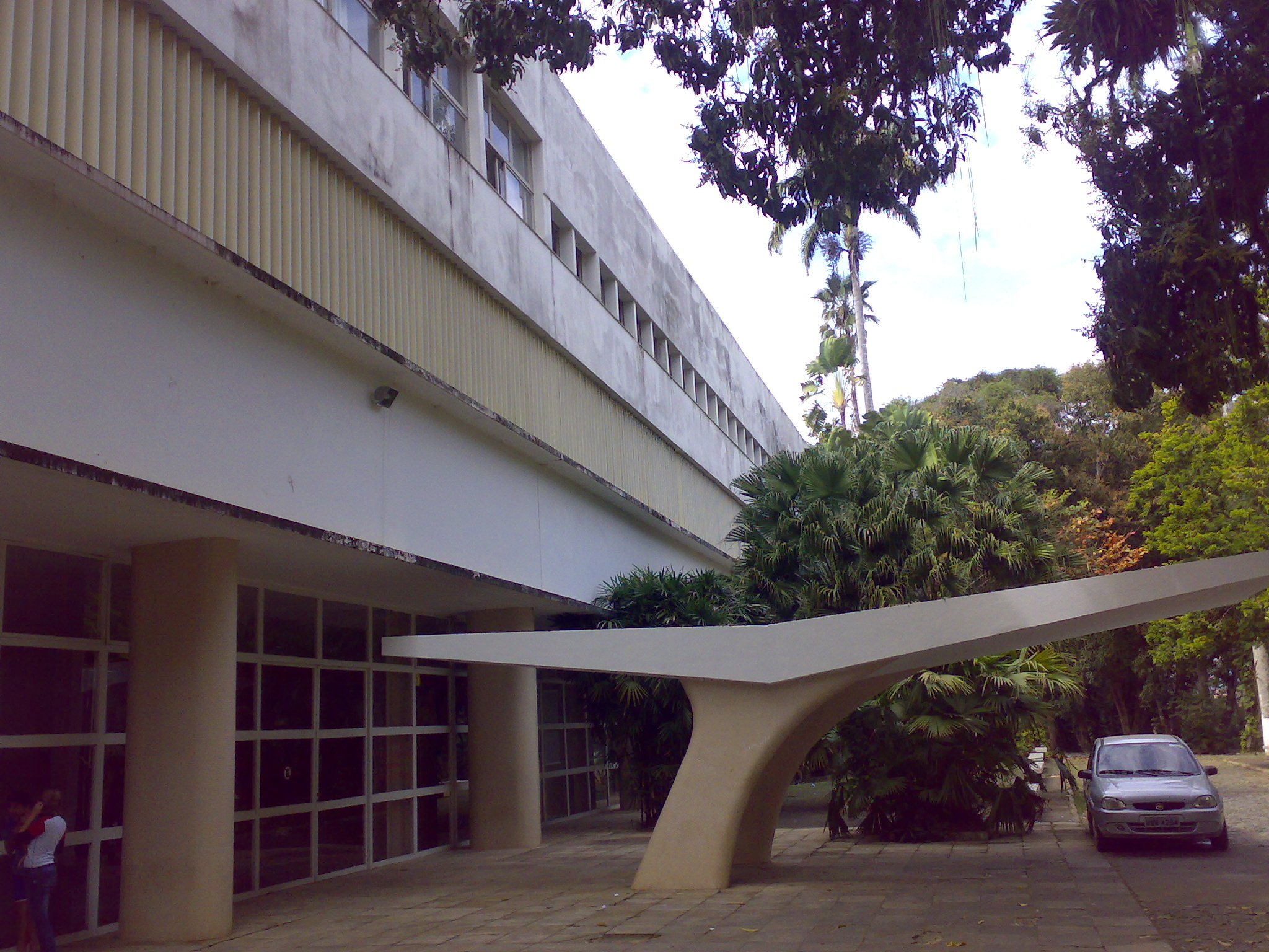 Projeto-síntese das intenções modernistas de artistas como Niemeyer, Burle Marx, Tenreiro e Portinari.